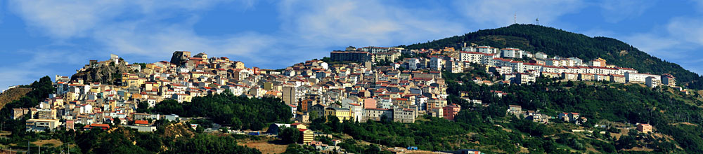 Panorama di Stigliano (provincia di Matera